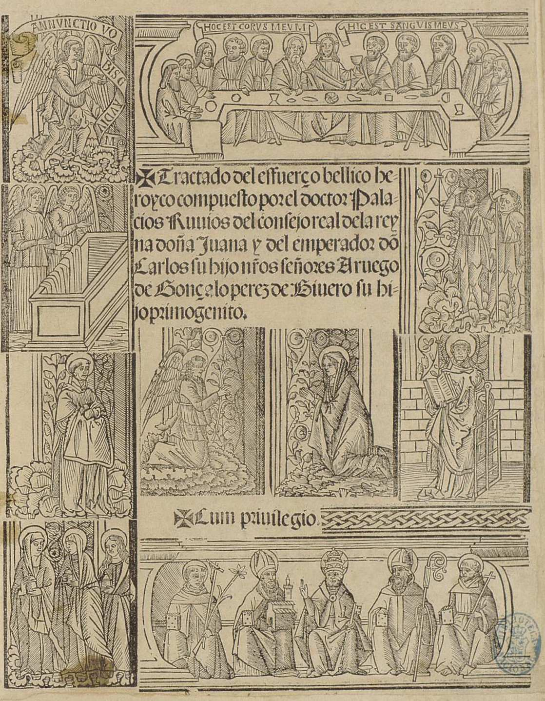 Portada compuesta con diferentes tacos xilográficos del Tractado del esfuerço bellico heroyco compuesto por el doctor Palacios Ruuios del consejo real de la reyna doña Juana y del emperador don Carlos su hijo nros. señores. A ruego de Gonzalo Pérez de Bivero su hijo primogénito, En Salamanca a expensas de Gaspar de Rossiñolis, 1524